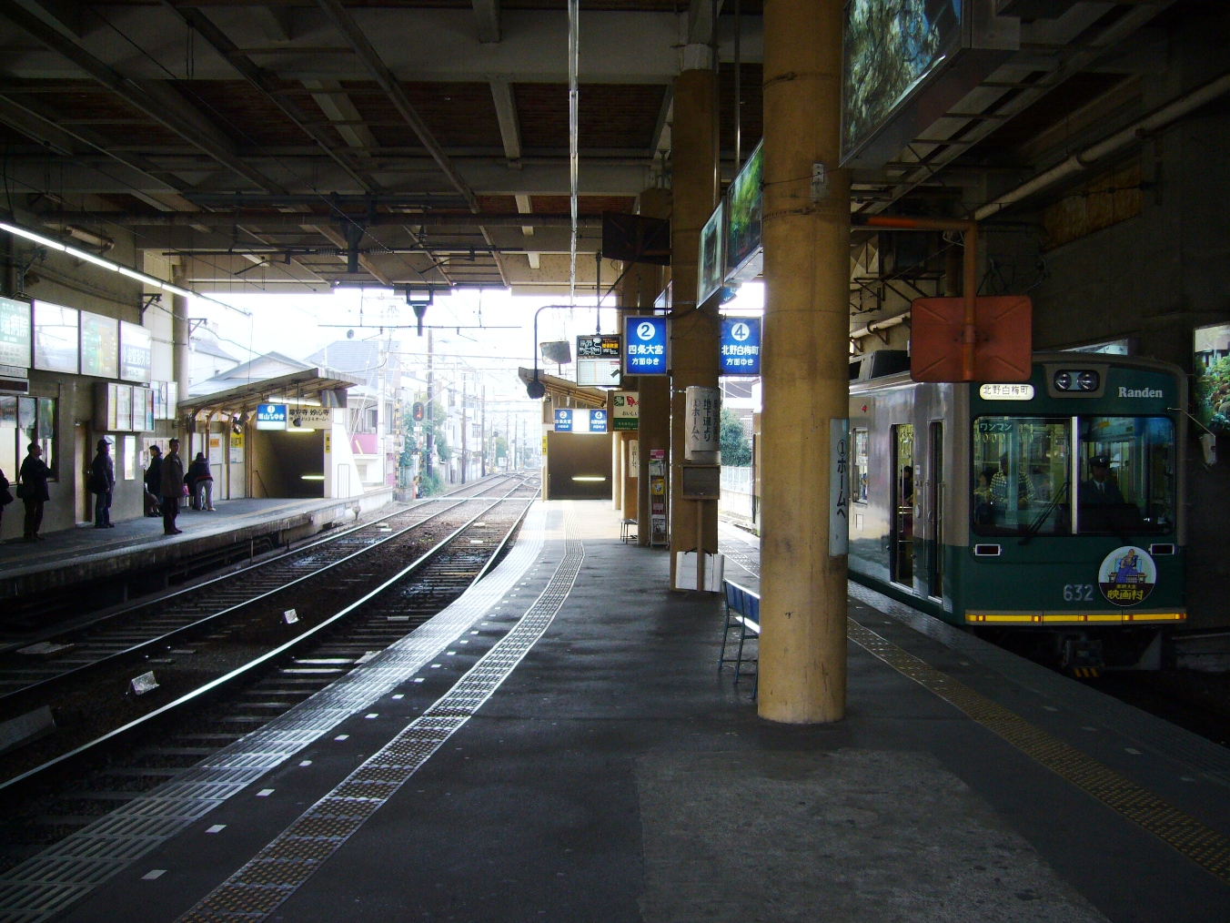 京都市右京区太秦帷子ヶ辻町にある京福電気鉄道帷子ノ辻駅のホーム。商業ビルで駅が覆われているため、一見橋上駅舎のようだが、駅舎は実は地下駅。2009年1月17日に投稿者が撮影。